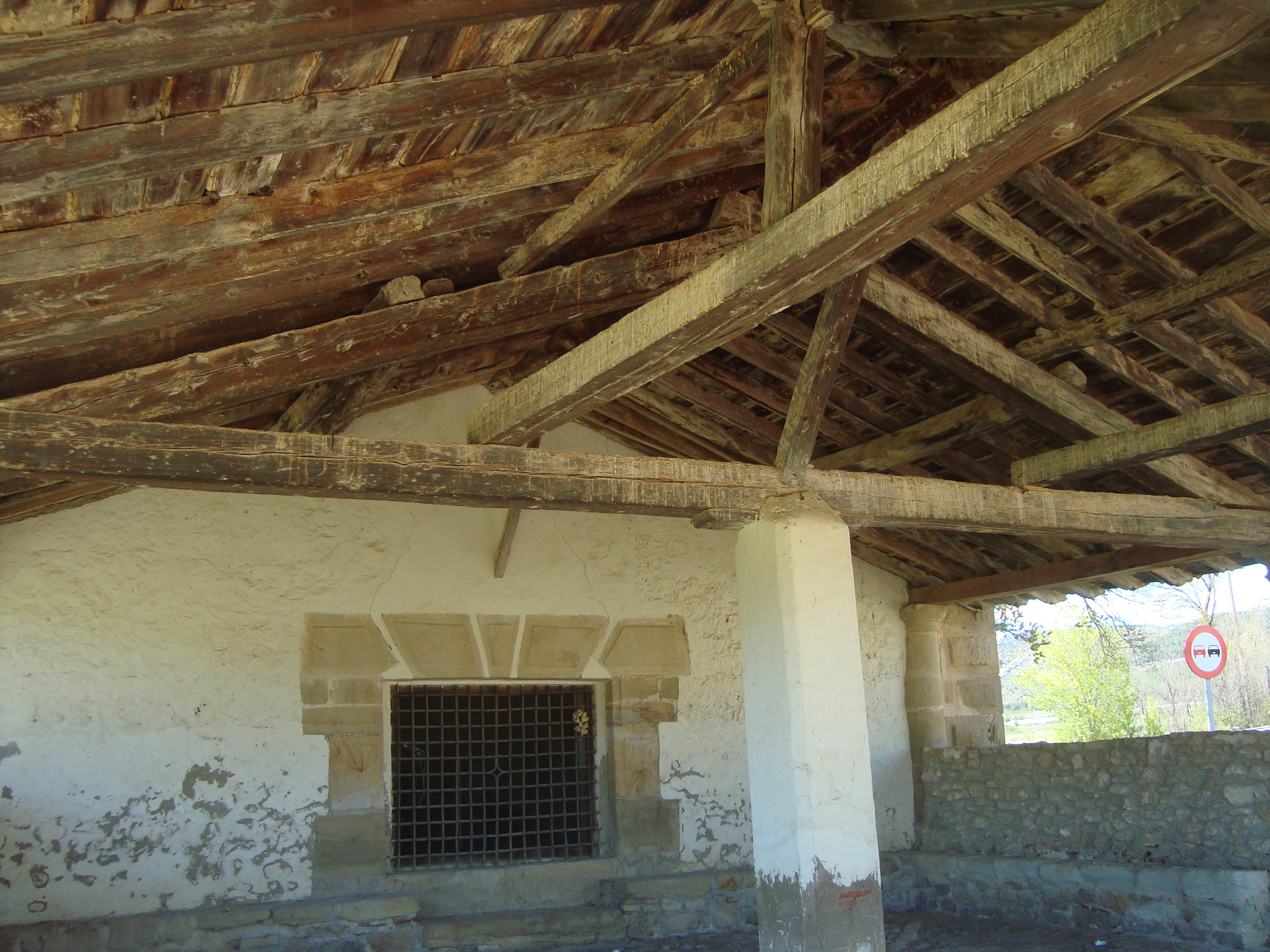 Ermita de San Roque (Rubielos de Mora, Teruel)